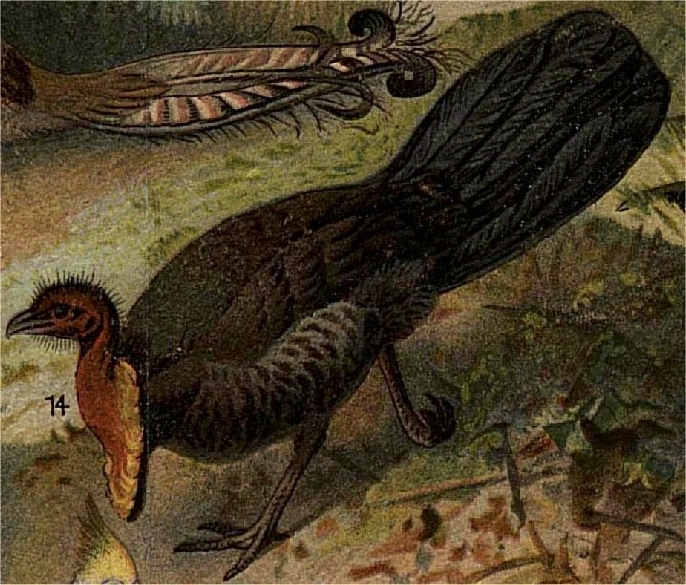 Talegalla-höns